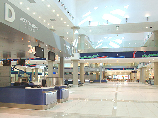 Departure desks at Bari Palese airport, Puglia, Italy